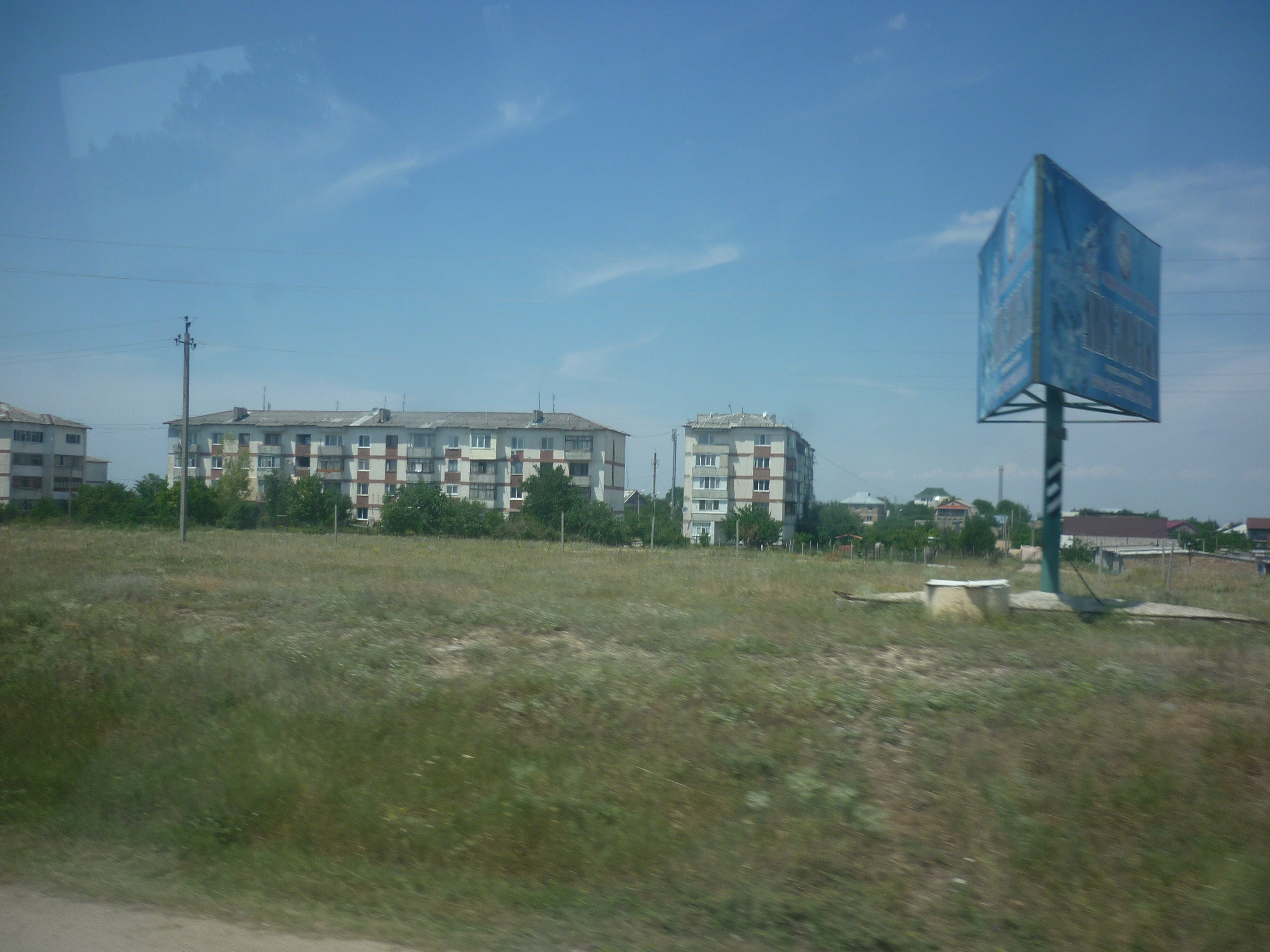 Село Дубки Сімферопольського району АР Крим